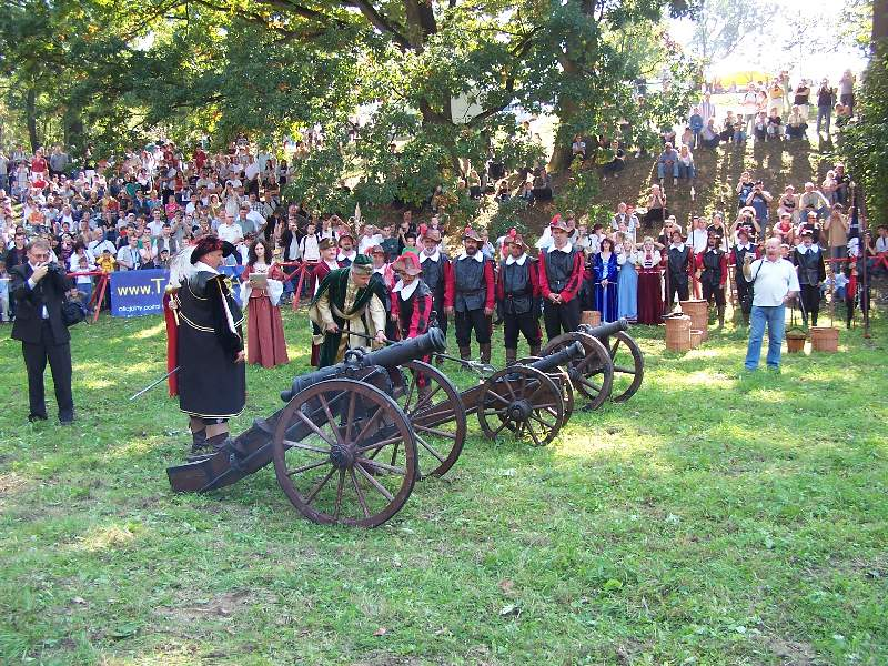 Dębno, Turniej Rycerski 2006.